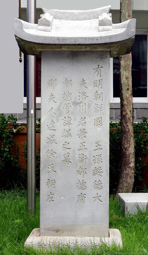 洛川君の墓。